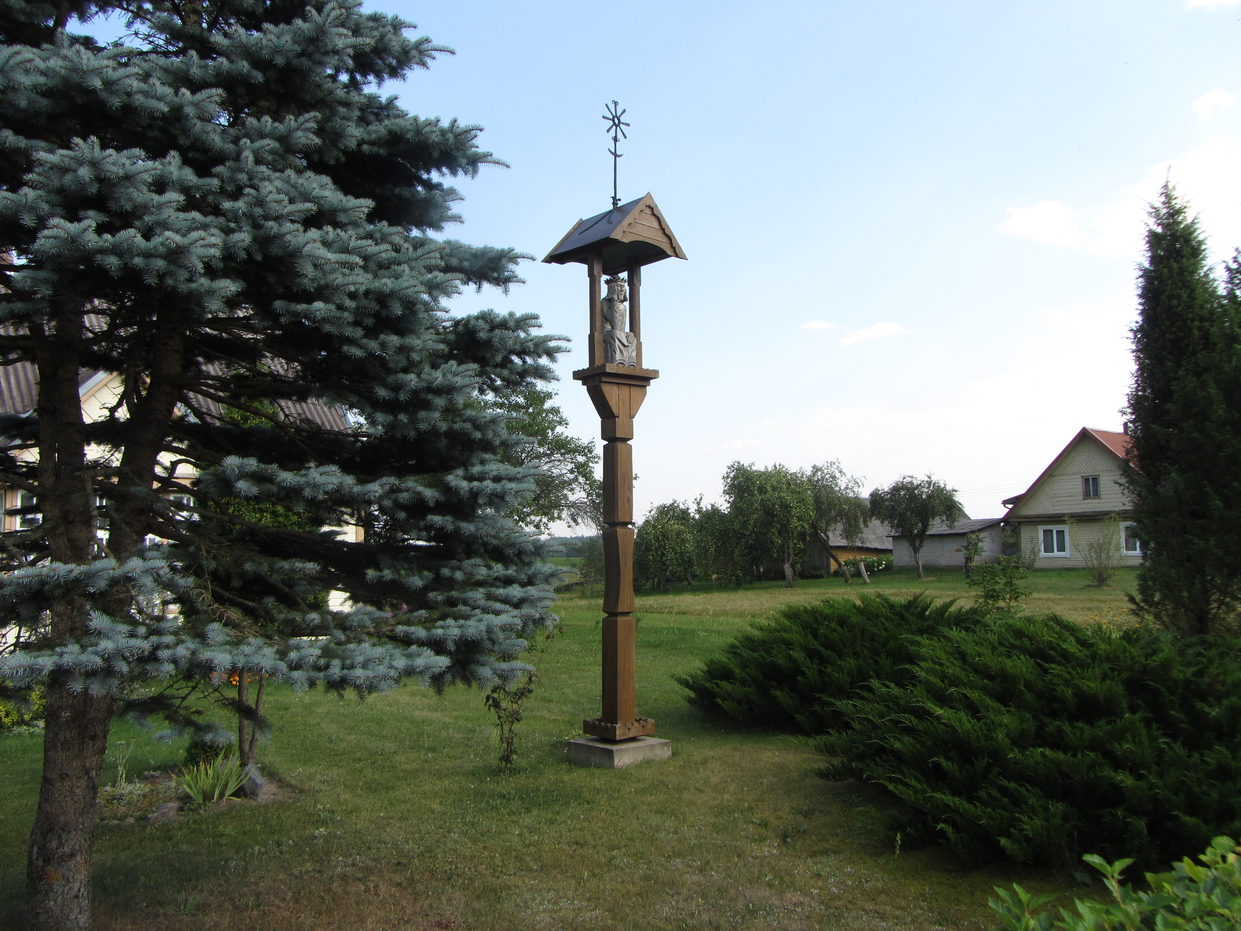 Paisetė I 28332, Lithuania